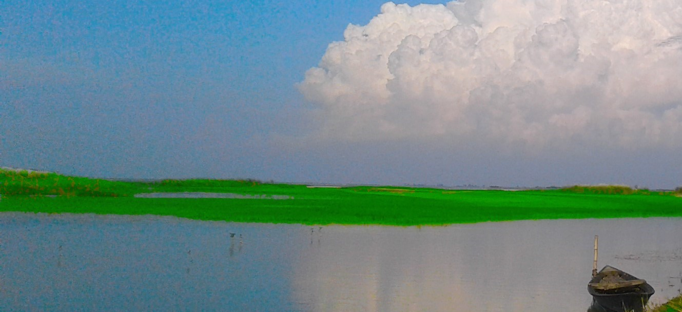 ব্রহ্মপুত্র নদীর তীরে শরৎতের আকাশ, নৌকা,এবং কাশফুল। ক্যাপশন ২০১৬।